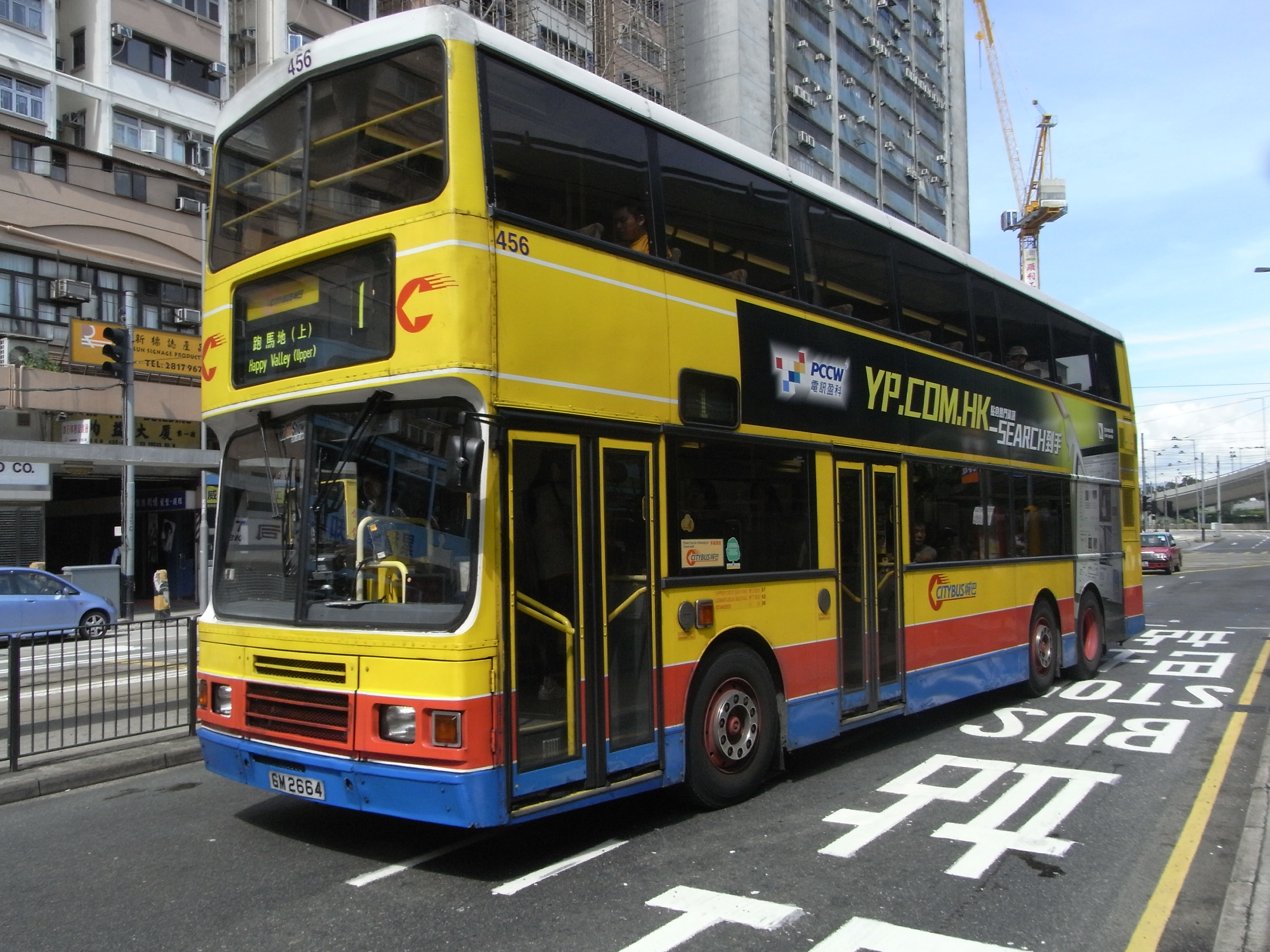 香港城巴1號線巴士